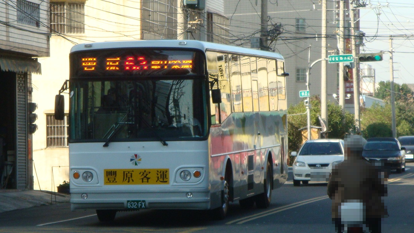 豐原客運632-FX行駛台中市公車63路。